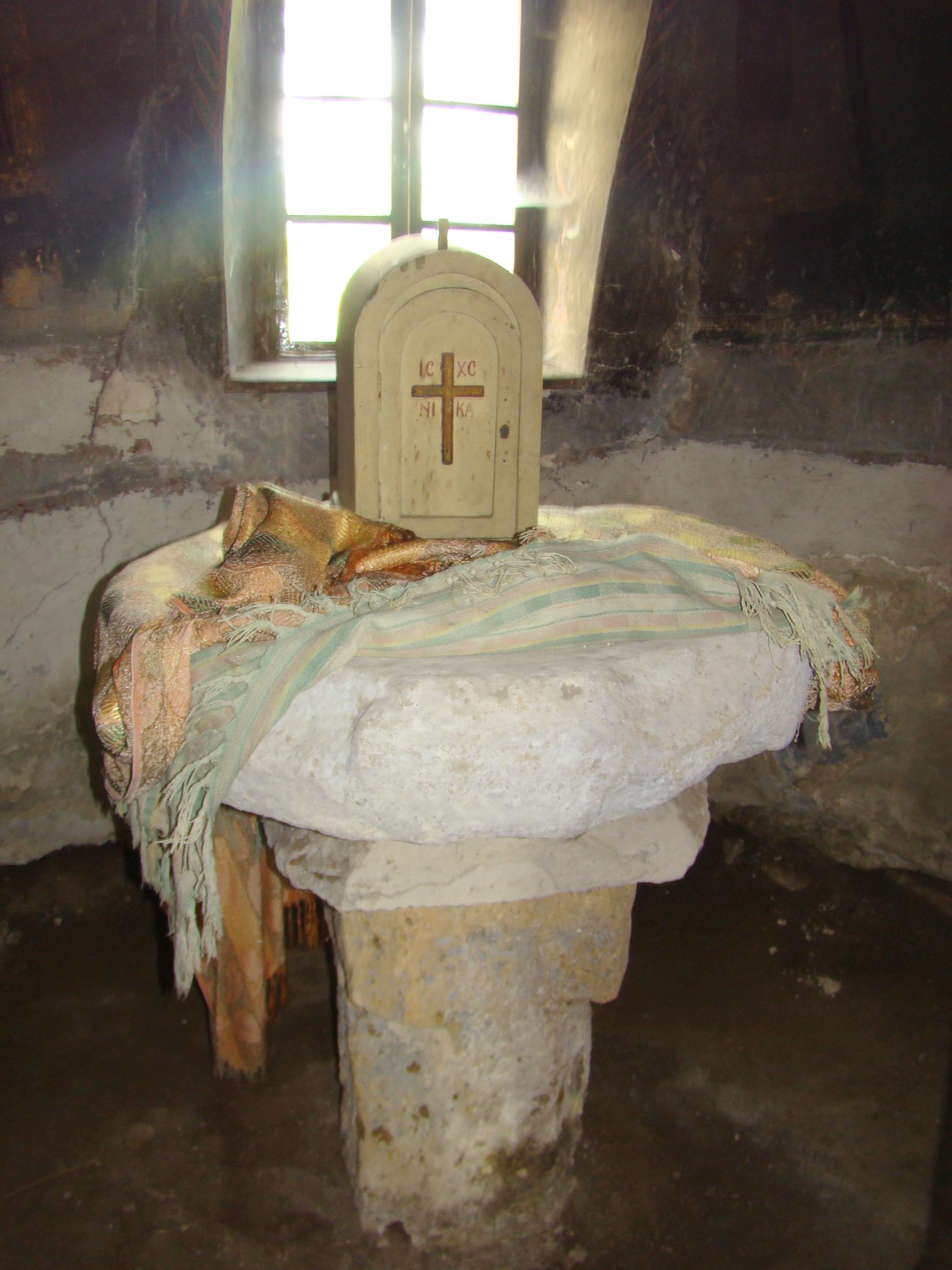 Biserica „Sfântul Prooroc Ilie”, sat Baru; comuna Baru